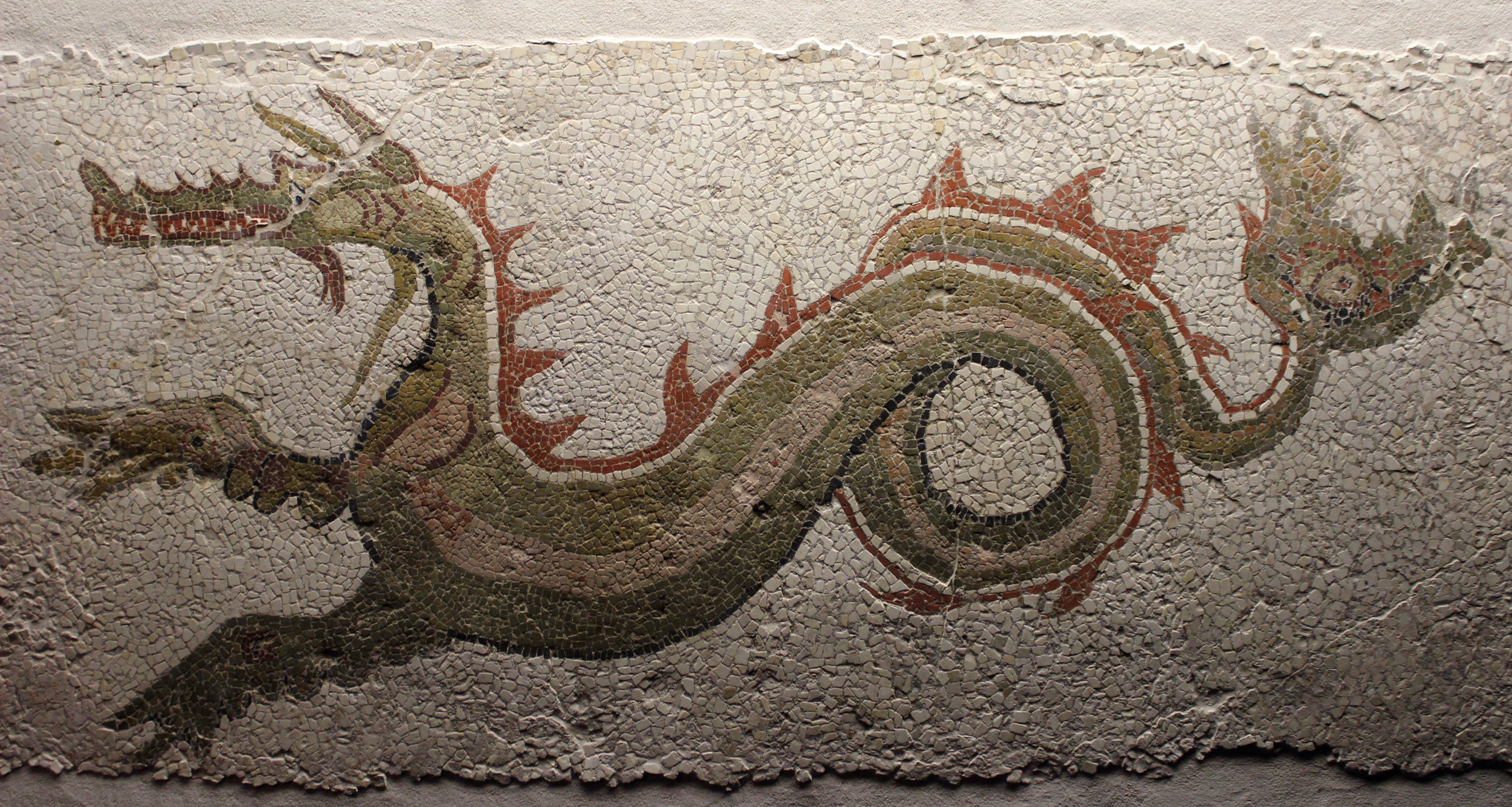 Mosaico con Ketos, de Kaulonia (Calabria).